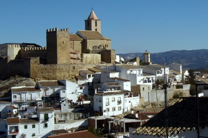 Foto del castillo de Iznájar